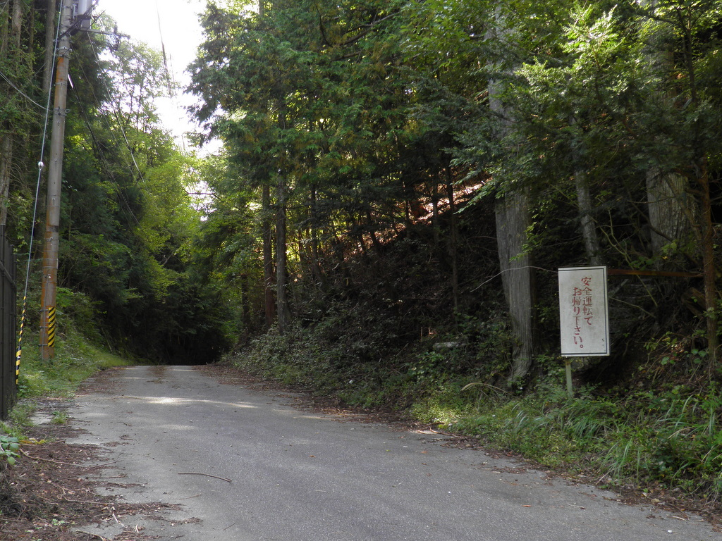 虻峠・洞川方面から見る。右に見えるのは峠名やそばの祠にあった役行者像などの由来を記した案内板。（奈良県吉野郡天川村）